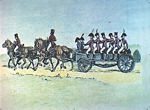 Ambulance hyppomobile conçue par Percy